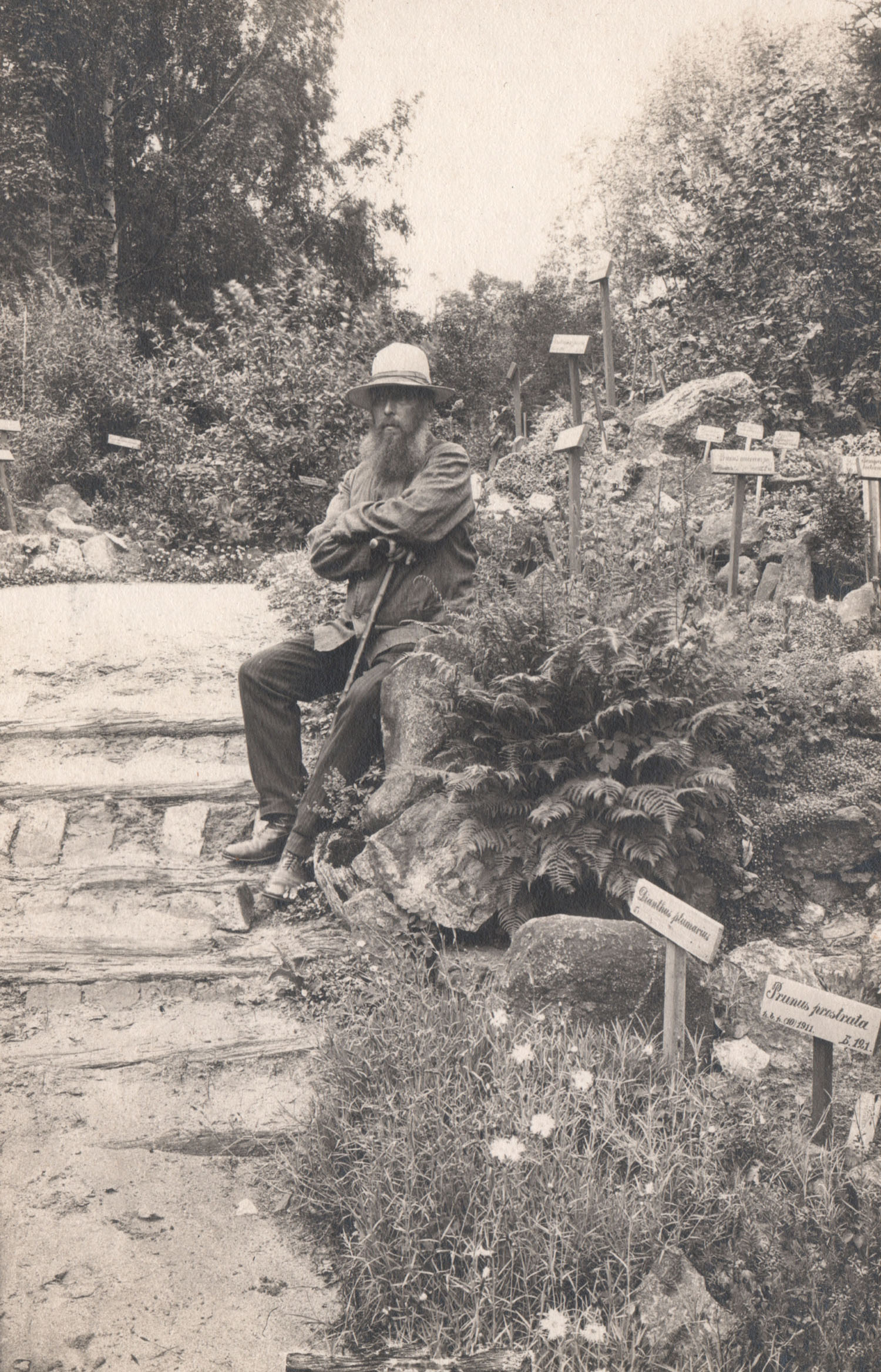 Э.Л. Вольф в дендрологическом саду. Фото 1910-х гг. Оригинал хранится в Фундаментальной библиотеке СПбГЛТУ из коллекции документов Т. Зуевой.